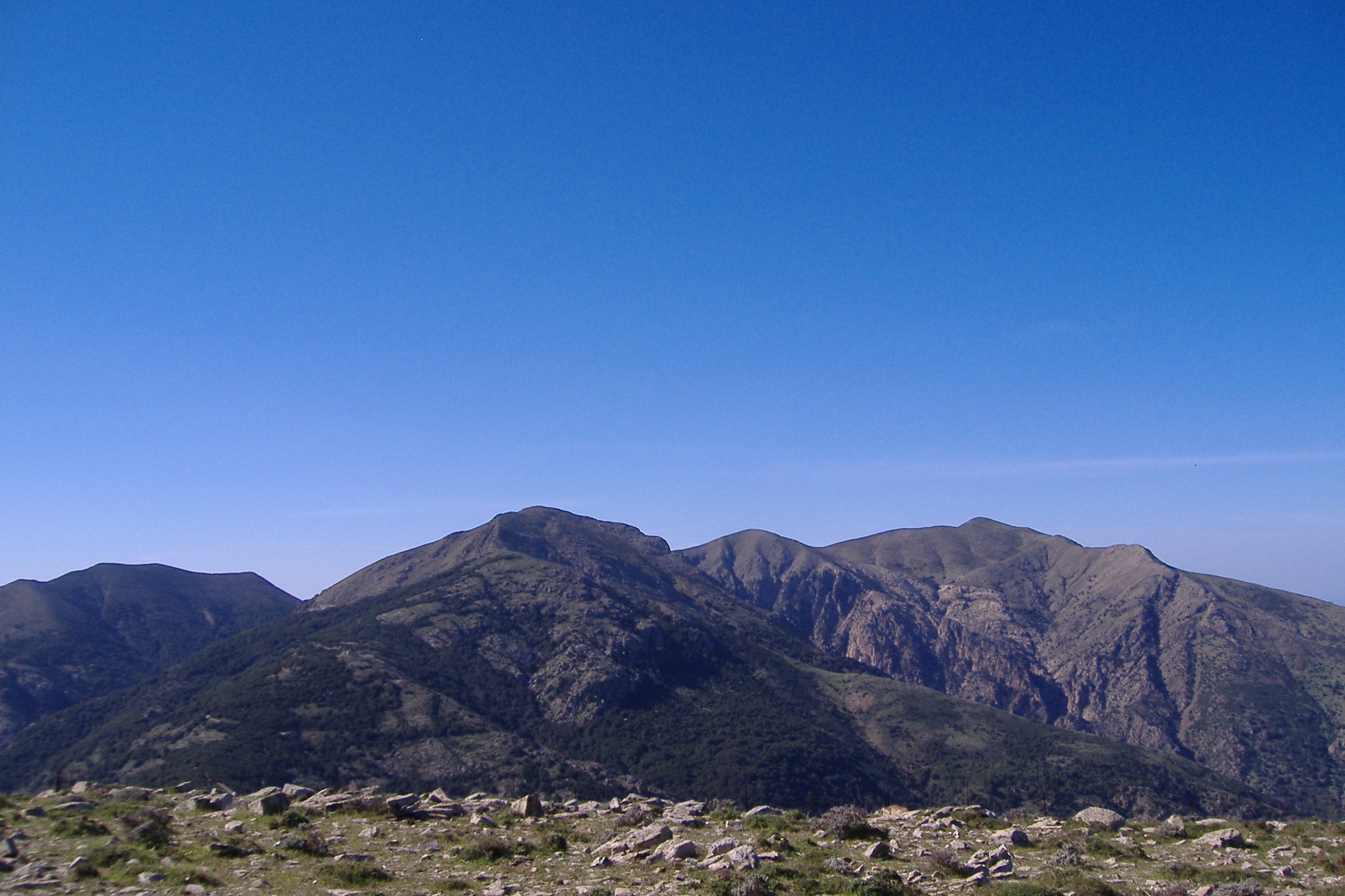 autore: Matteo(Xmatte) descrizione: Monte Linas visto da nord-ovest licenza d'uso: rilasciata sotto GFDL